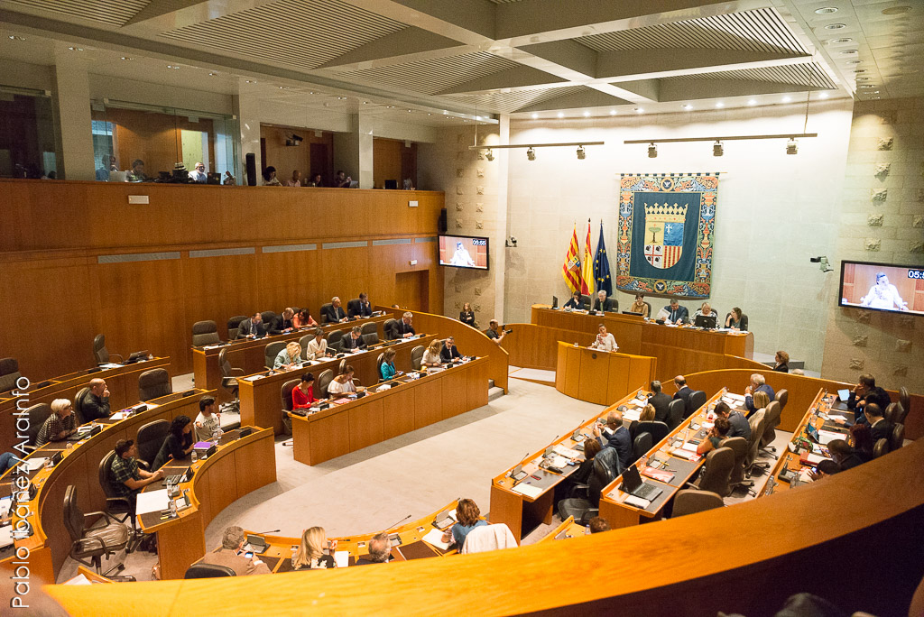 Debate de Aragón_segundo día_marca de agua_foto-Pablo Ibáñez-24